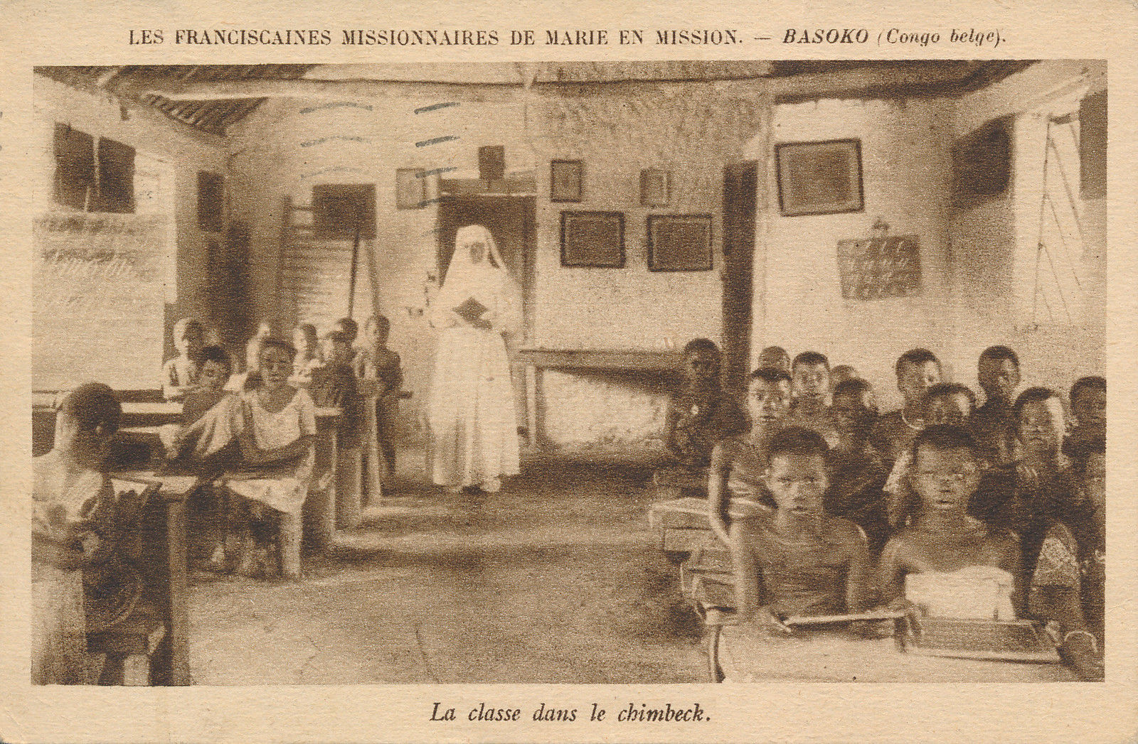 Classe dans le Chimbek par les franciscaines missionnaires de Marie (Congo belge).